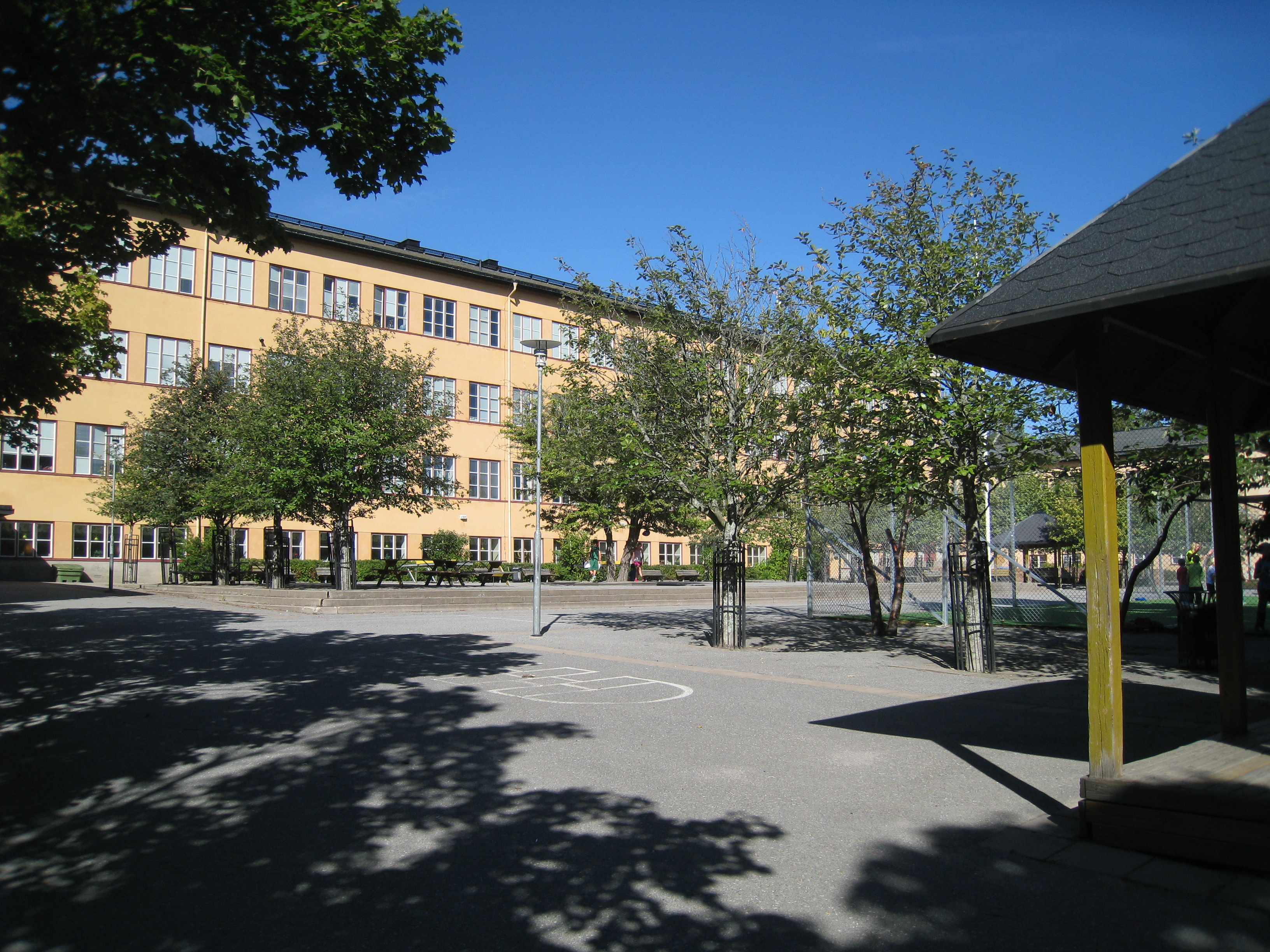 Norra Ängby skola i Bromma, väster om Stockholm. Skolan ligger på Vultejusvägen 20 i Norra Ängby och byggdes 1936. Arkitekt var Ture Ryberg.